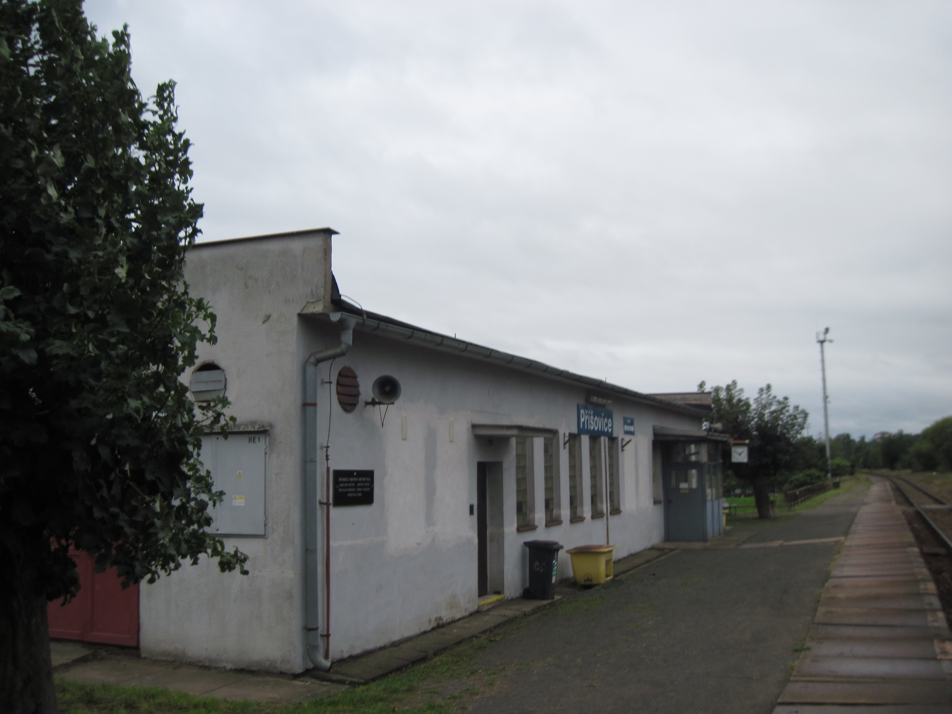 železniční stanice Příšovice